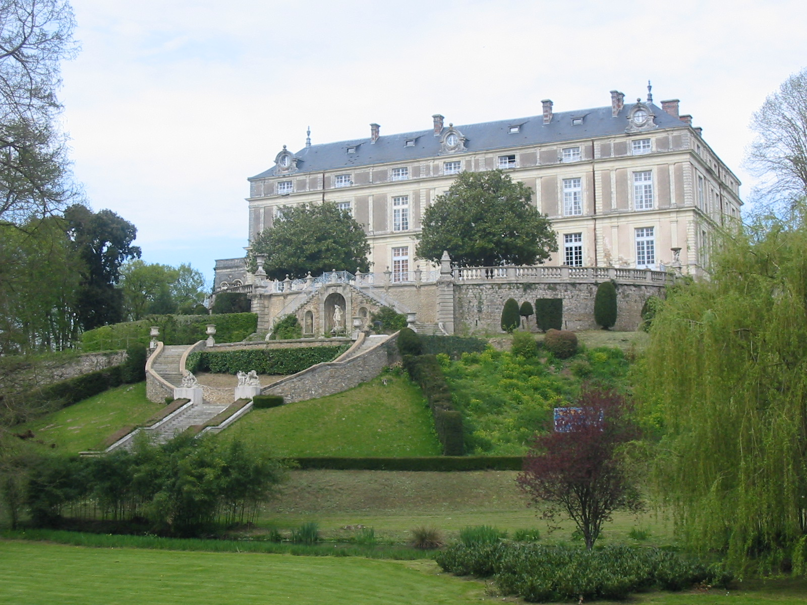 Château Colbert à Maulévrier (Maine-et-Loire, France).